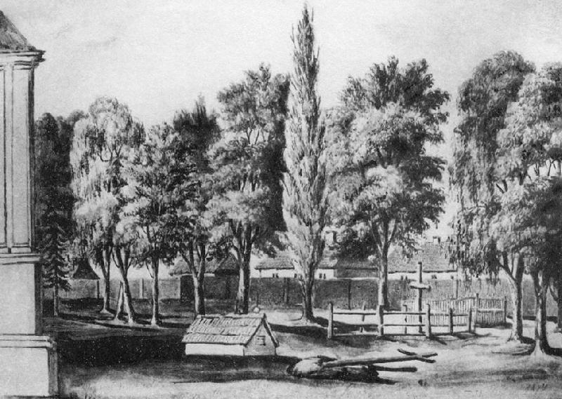 Беларуская (тарашкевіца): Напалеон Орда. Надмагільле Францішка Карпінскага, в. Лыскава, Пружанскі раён